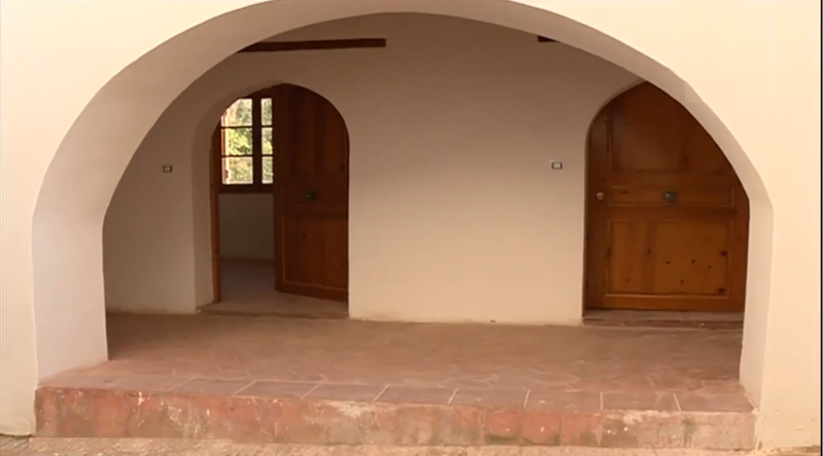 Mosquée Djamâa Aâdham de la Casbah de Béjaïa مسجد الجامع الأعظم في قصبة بجاية